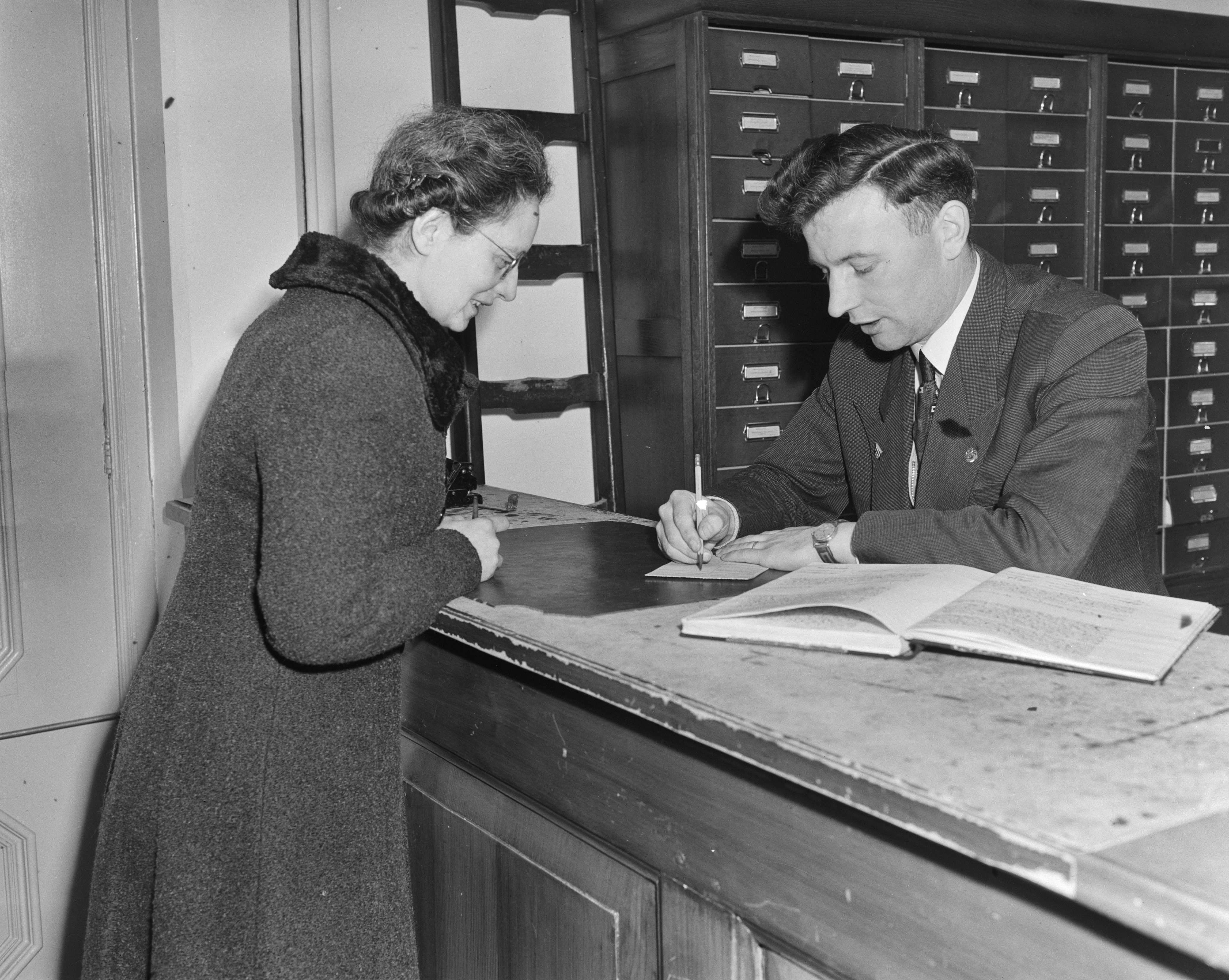 Collectie / Archief : Fotocollectie Anefo Reportage / Serie : [ onbekend ] Beschrijving : Serie bezoek bij Abe Lenstra (familie) Datum : 29 januari 1952 Trefwoorden : FAMILIE, SERIEs, bezoeken Persoonsnaam : Lenstra, Abe Fotograaf : Pot, Harry / Anefo Auteursrechthebbende : Nationaal Archief Materiaalsoort : Negatief (zwart/wit) Nummer archiefinventaris : bekijk toegang 2.24.01.04 Bestanddeelnummer : 904-9532